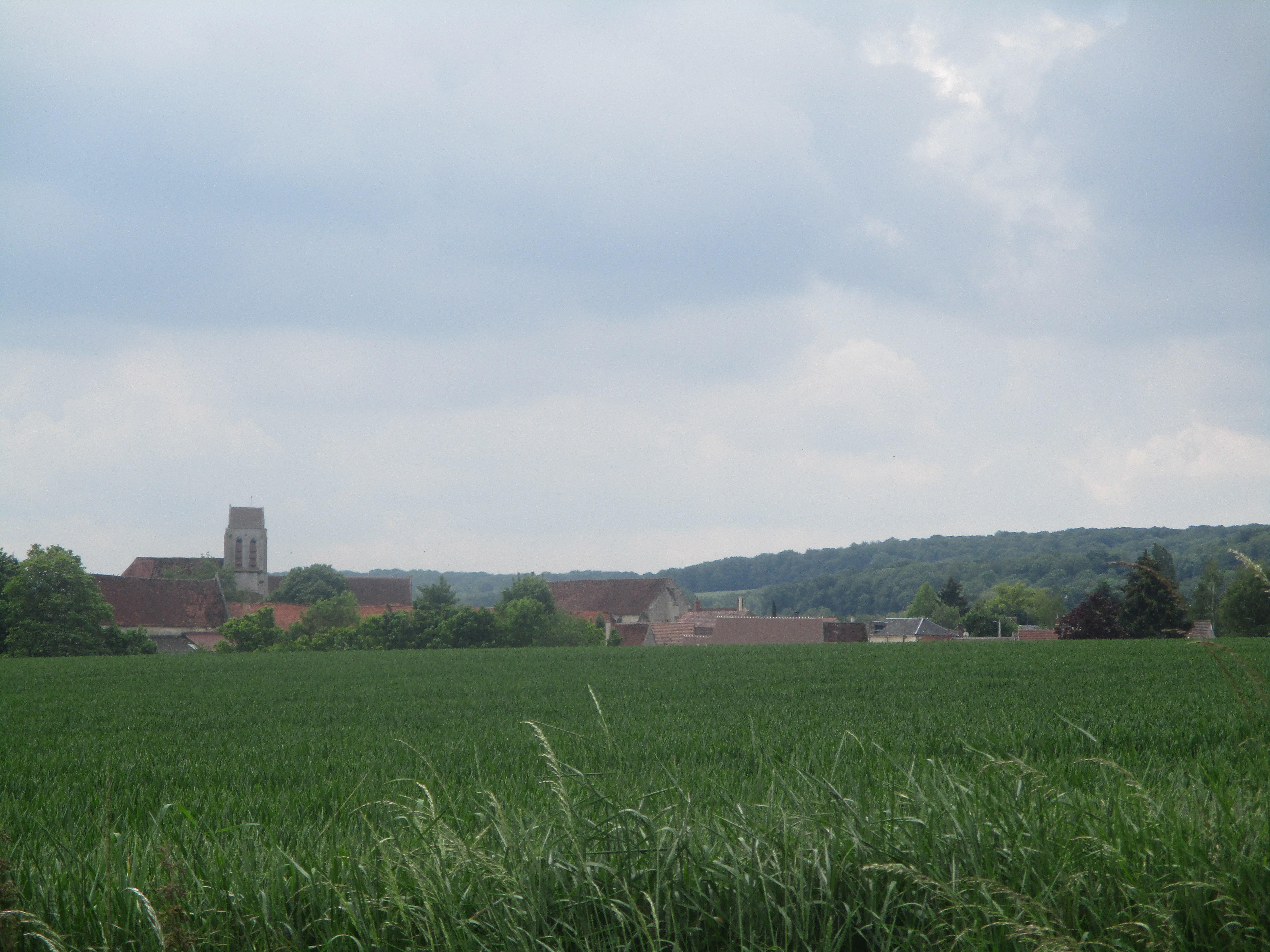 Ully-Saint-Georges.